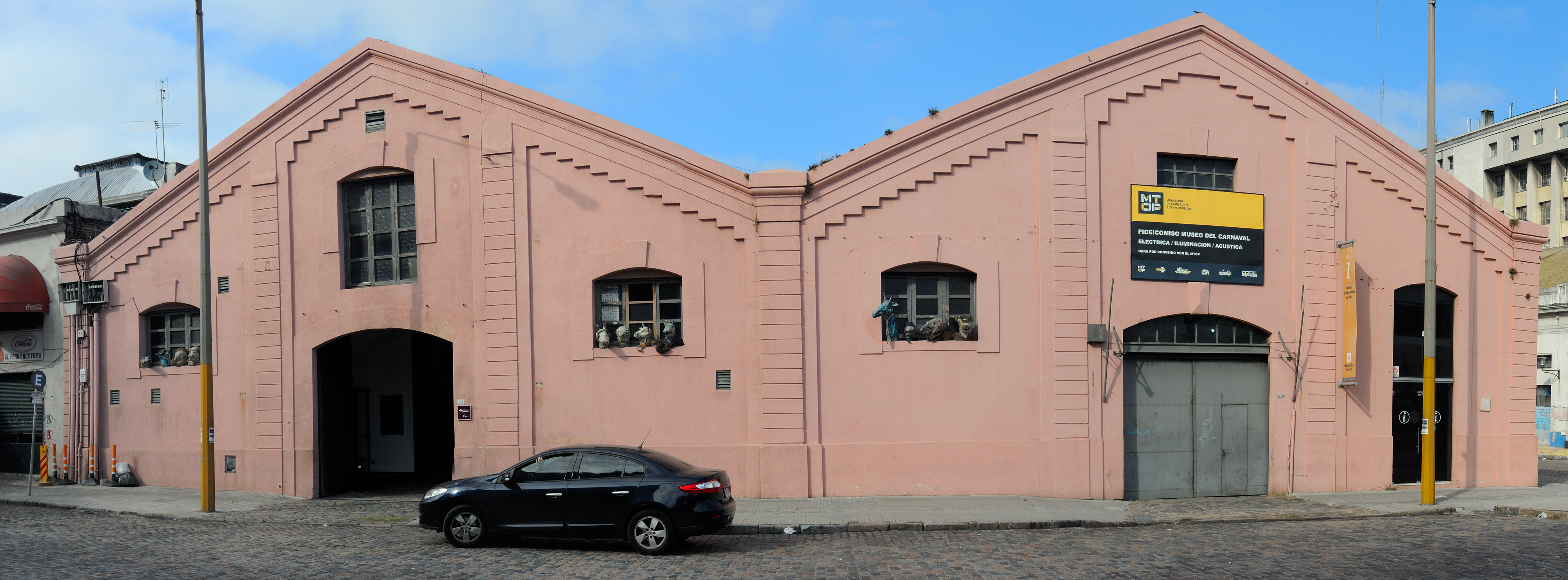 Fachada del Museo del Carnaval en Montevideo, Uruguay